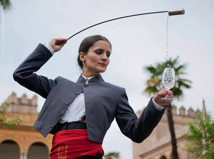 Venencia, venenciador, venenciadora, vino de jerez, sherry wine